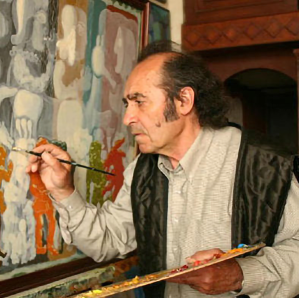 Arkadi Petrosyan - Արկադի Պետրոսյան